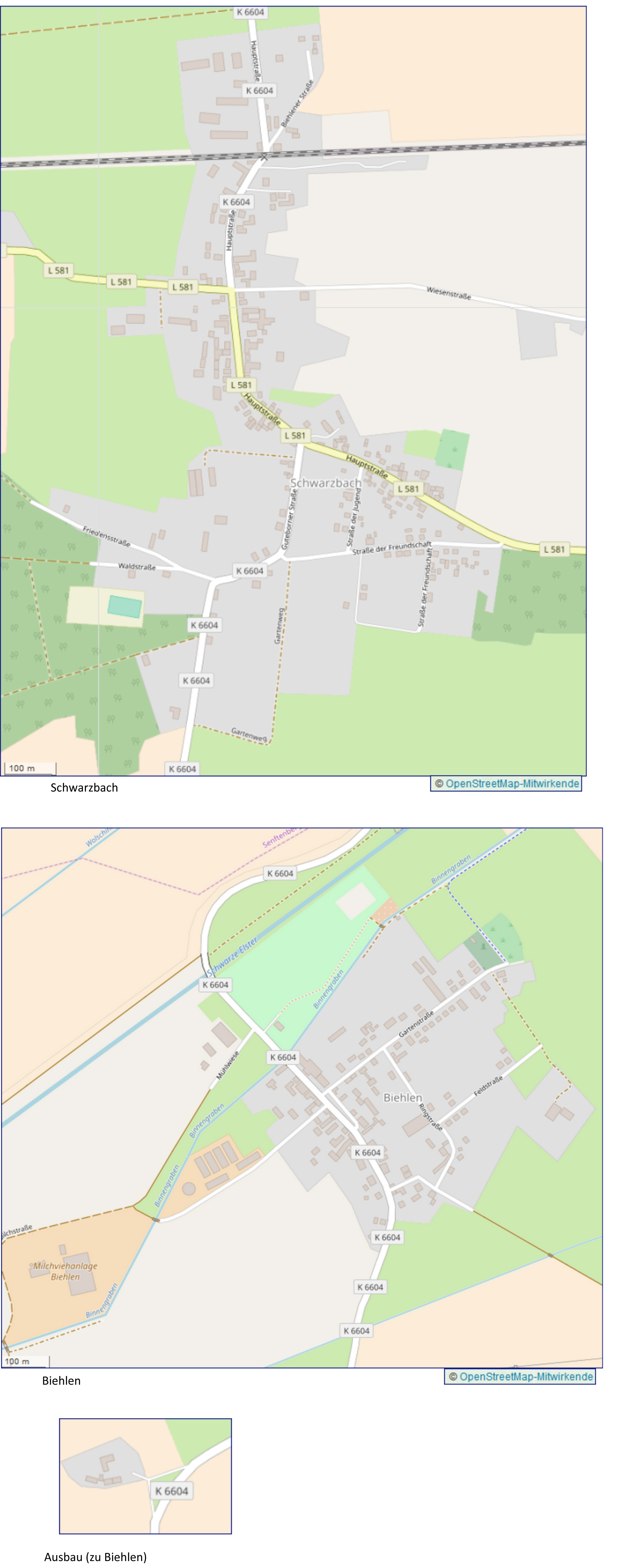 Übersichtsplan Straßen in Schwarzbach mit Gemeindeteil Biehlen aus OpenStreetMap